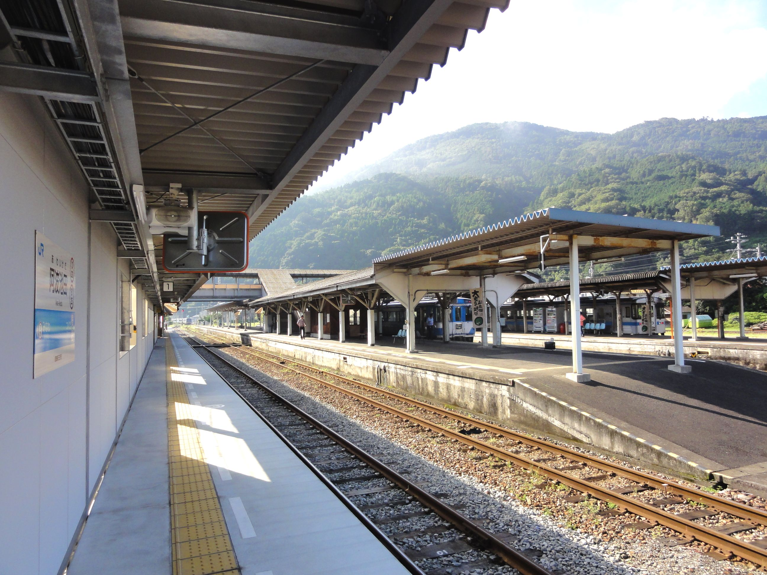 阿波池田駅